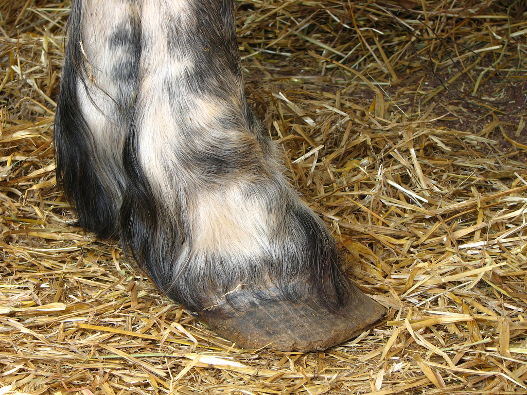 Pied d'un Percheron à Texcoco de Mora, au Mexique